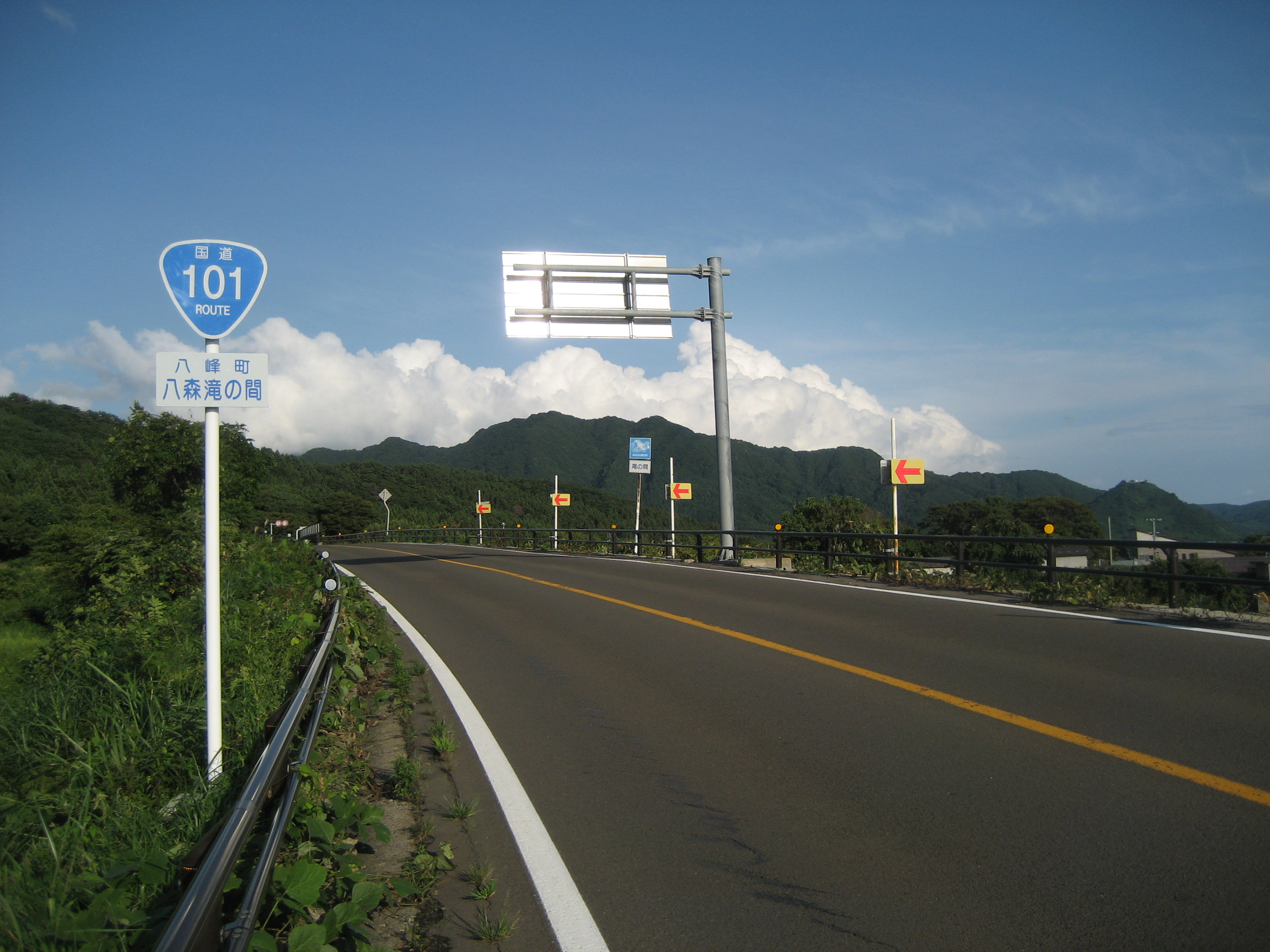 国道101号線秋田県山本郡八峰町八森滝の間付近（能代市方面を撮影）